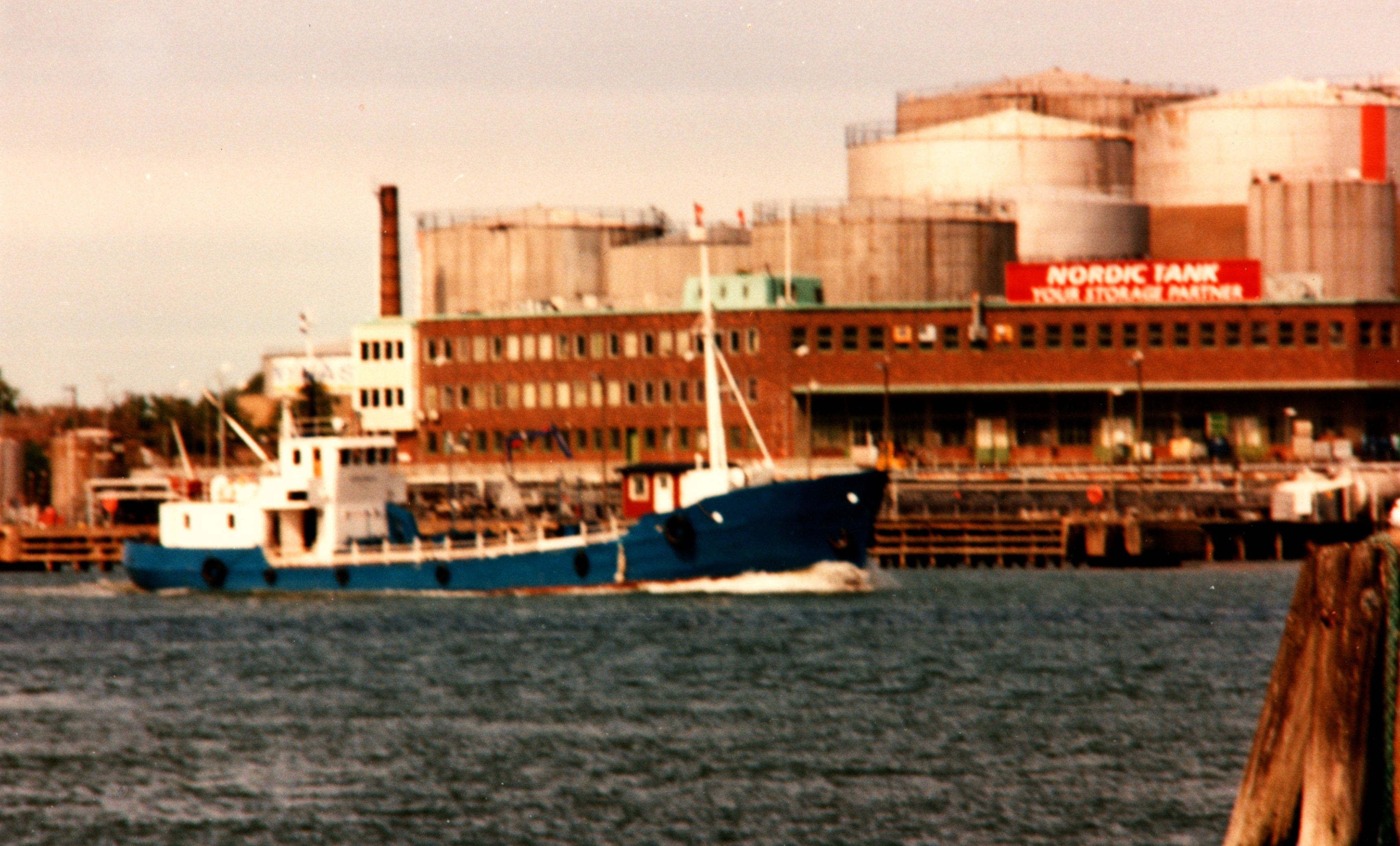 Oljehamnen Göteborg, ca 1982